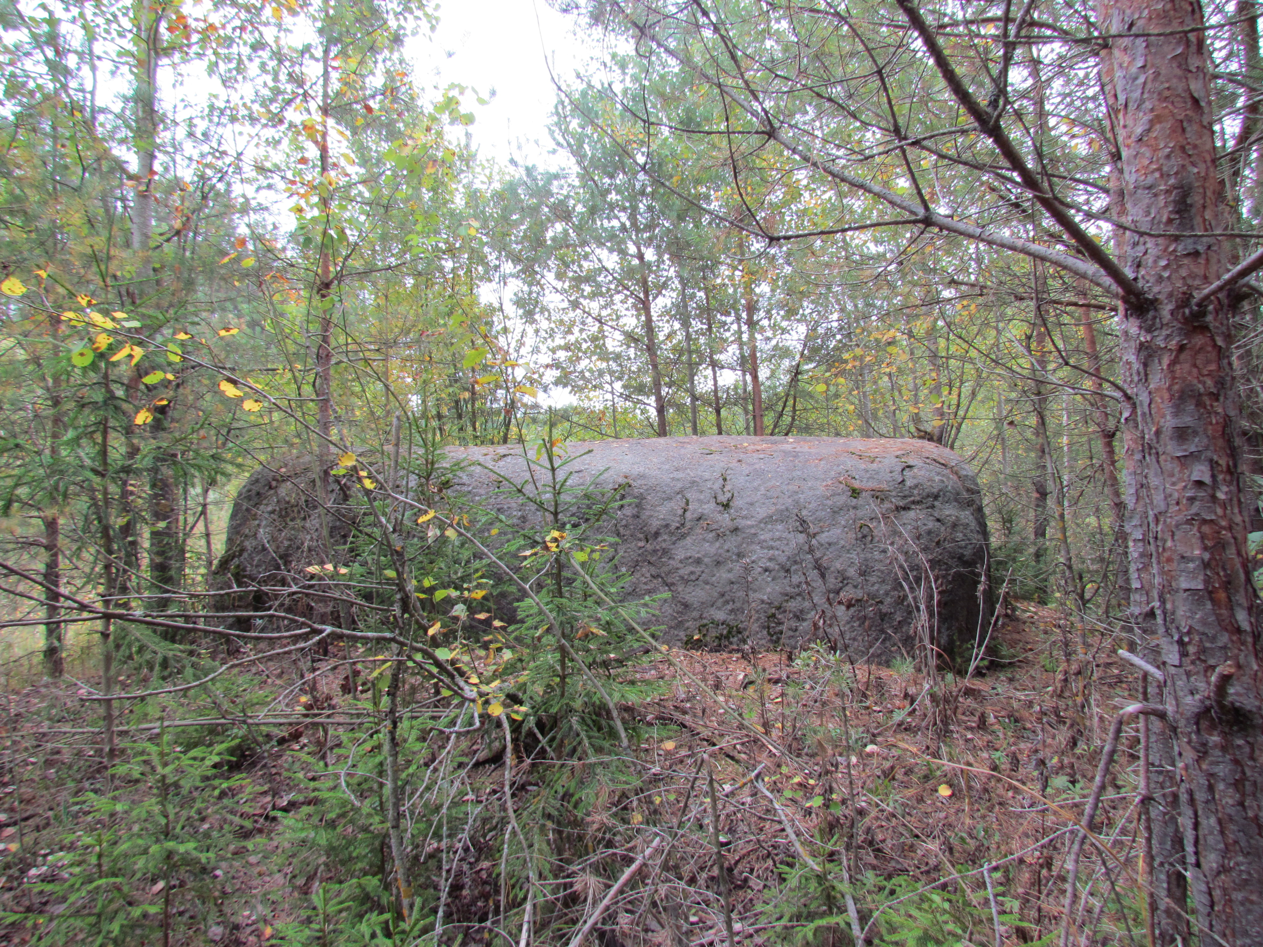 Беларуская (тарашкевіца): Вёска Кудаева. Валун